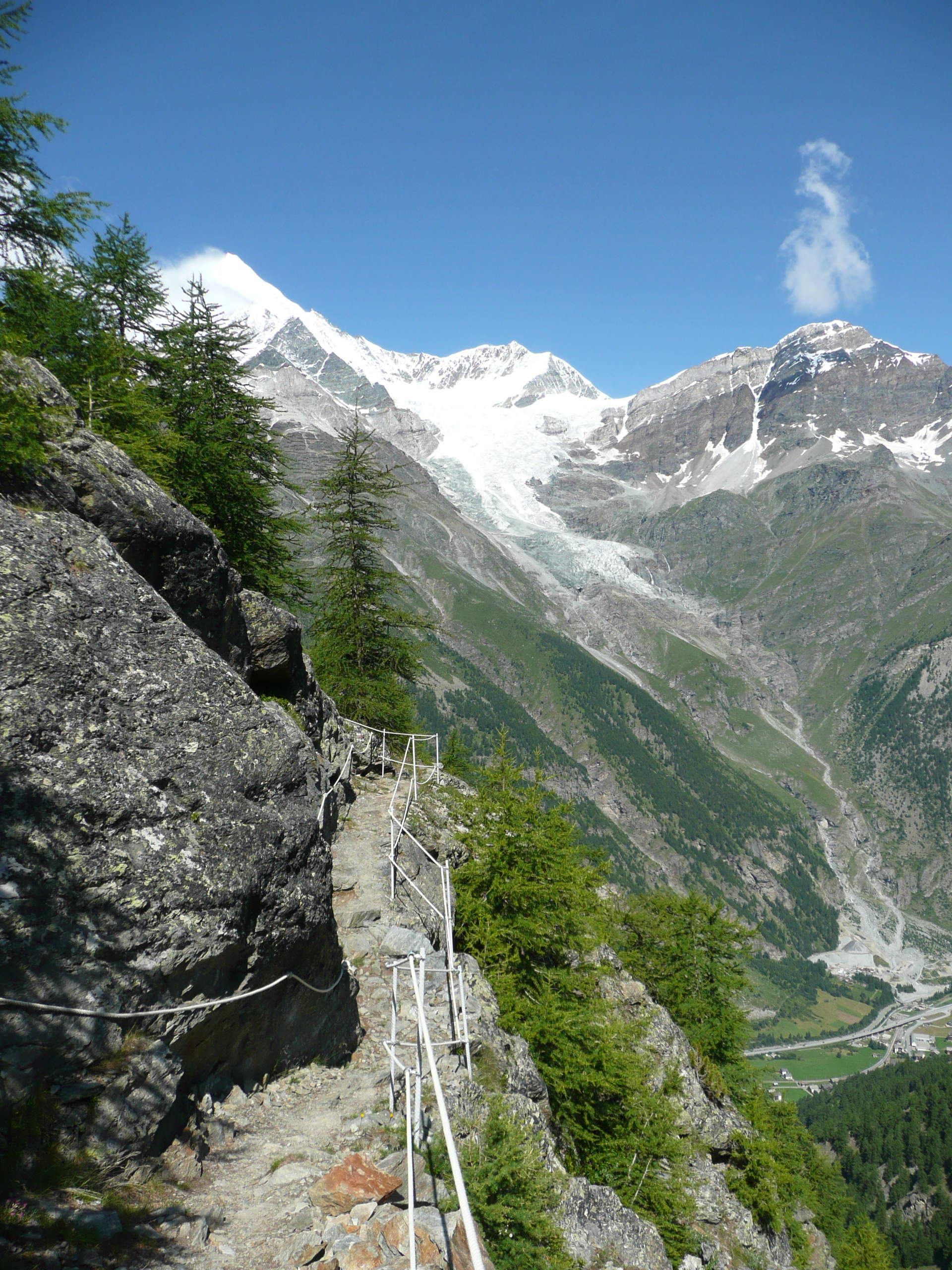 Europaweg